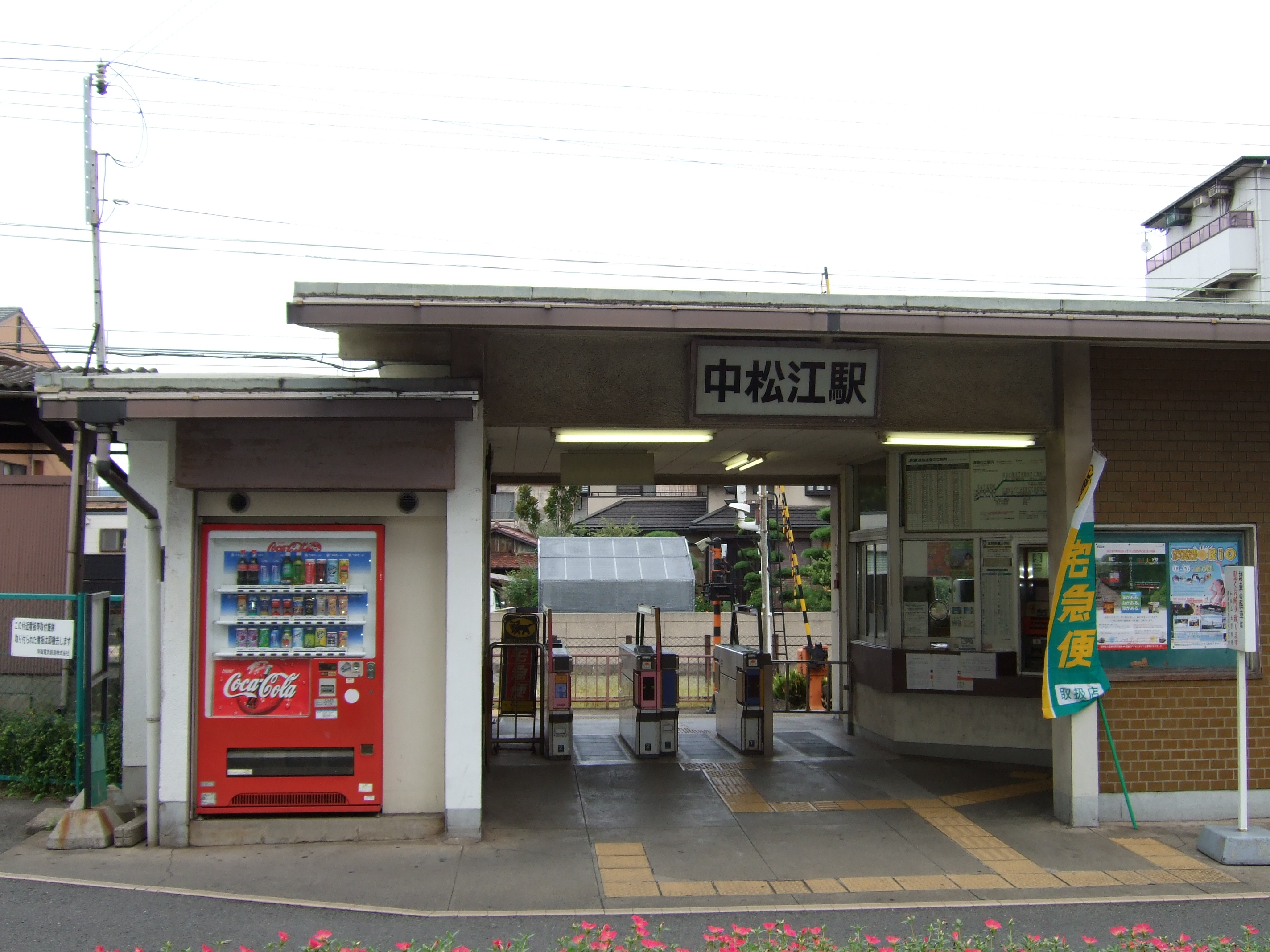 中松江駅駅舎